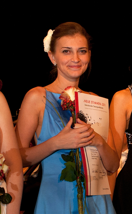 Finalkonzert